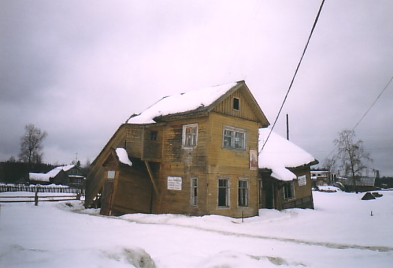 Главное здание (диспетчерская). Вид с северо-востока. Семигородняя, Харовский район, Вологодская область.